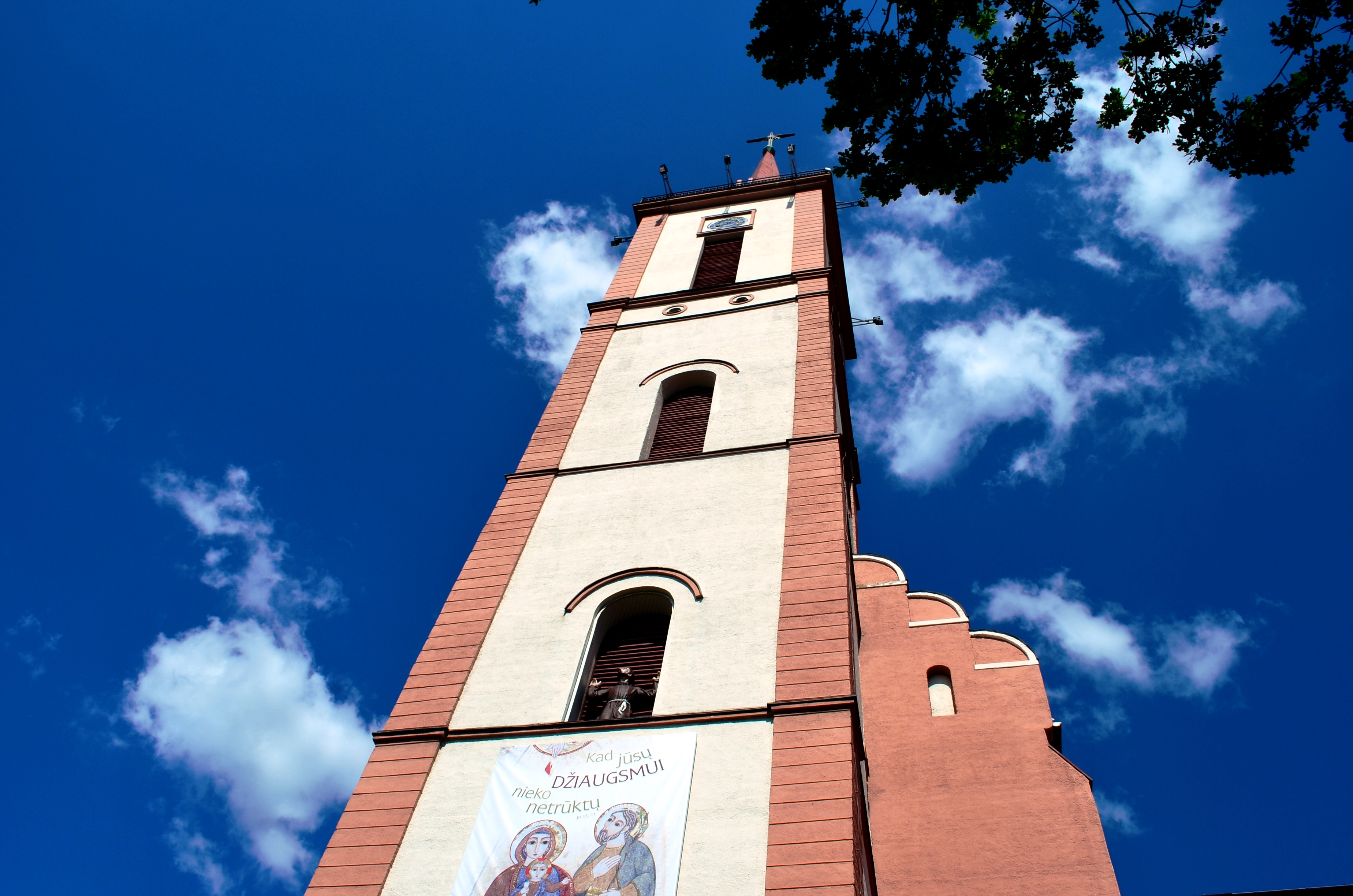 Kretingos Šv. Mergelės Marijos bažnyčia